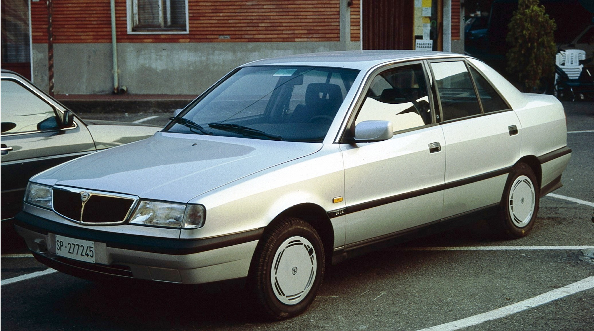 Lancia Dedra in Liguria